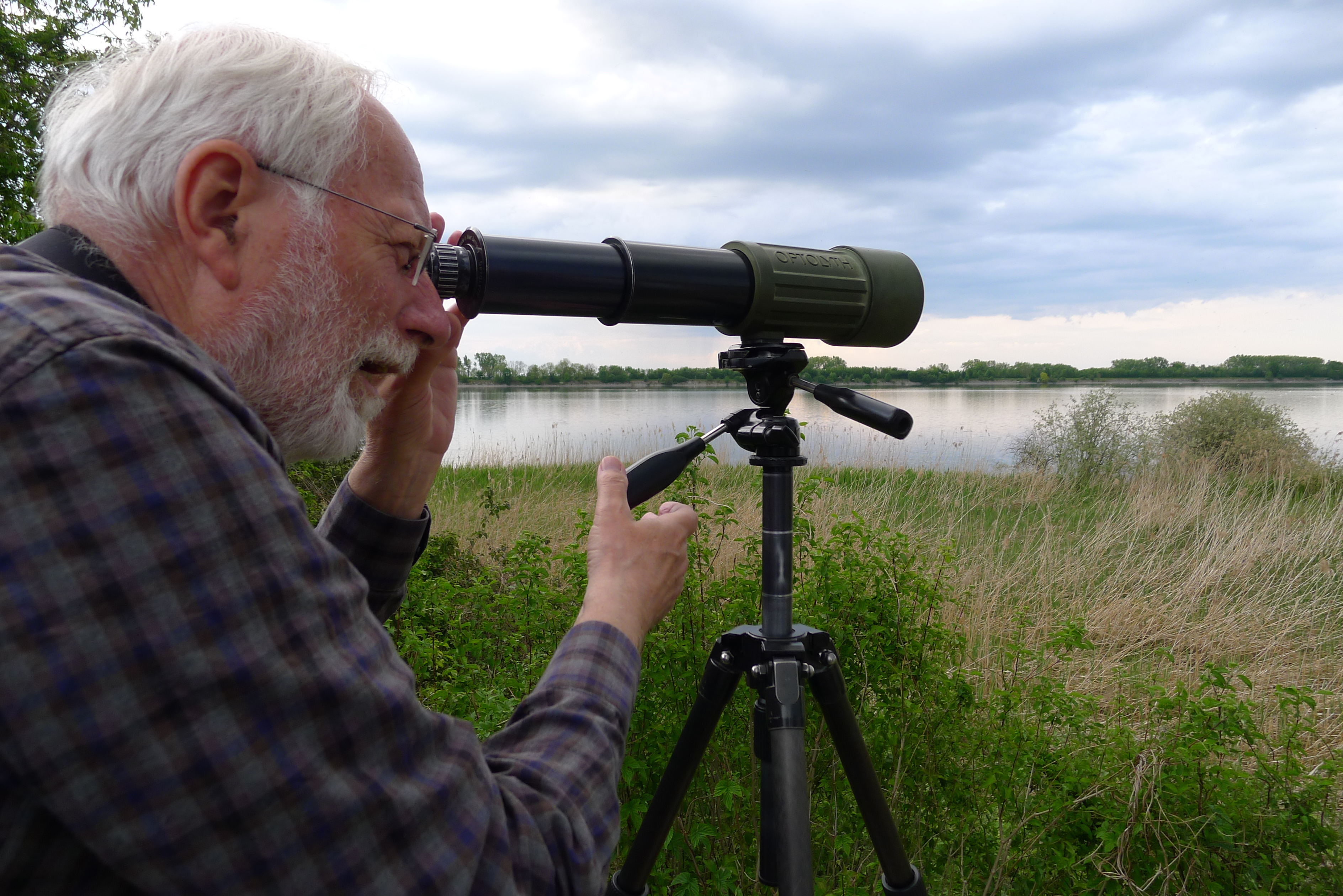 Mitglieder des WikiMUC bei der Vogelstimmen-Exkursion an den sonst nicht zugänglichen Speicherseen bei Ismaning unter der Führung des Naturschützers Manfred Siering.